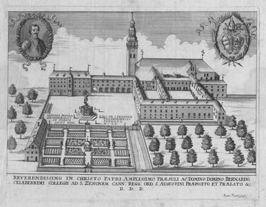 Kupferstich des Klosters St. Zeno, Bad Reichenhall, Bayern